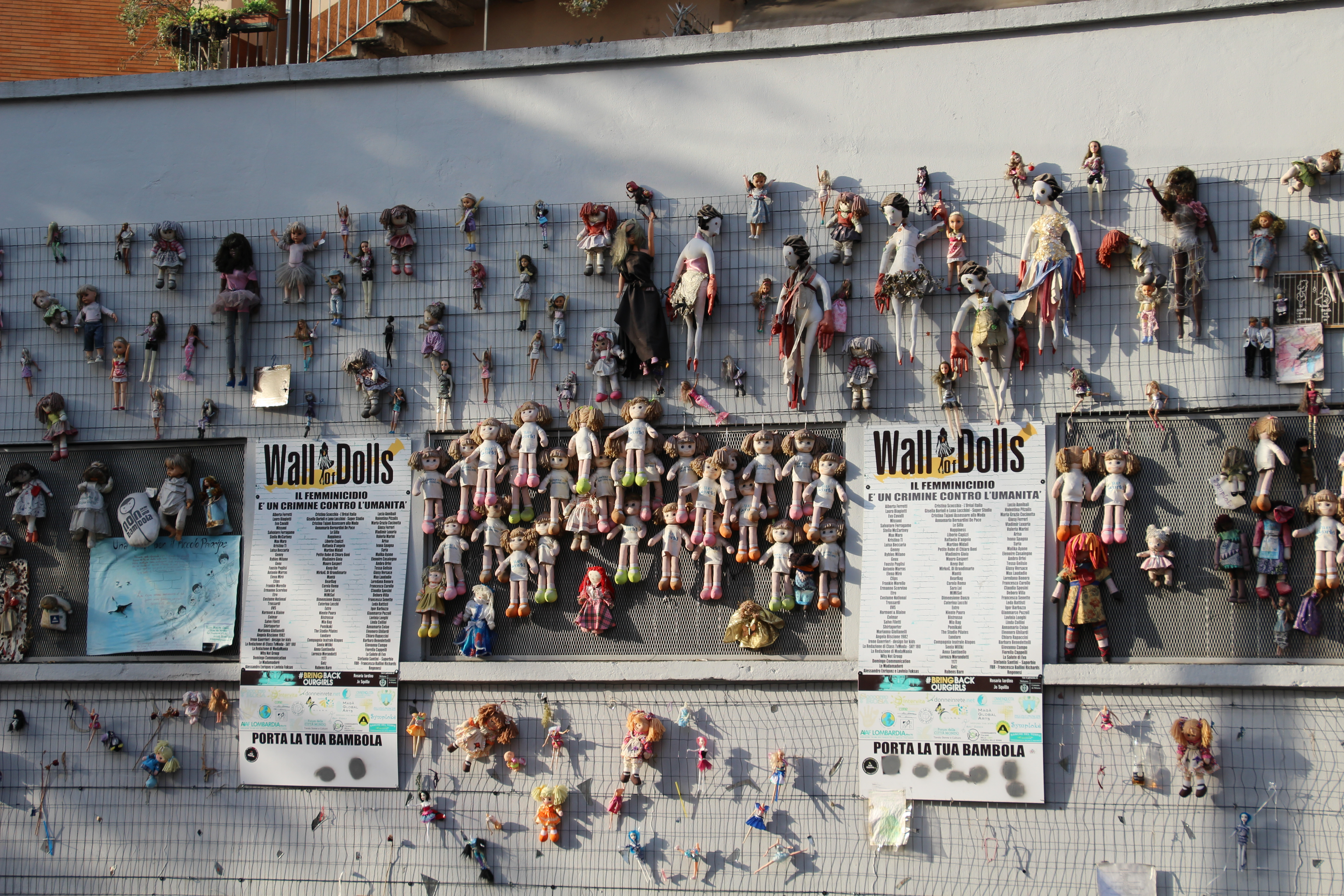 Ticinese : Via Edmondo de Amicis L'exposition " Le mur des poupées " à Milan a été réalisé pour mettre en lumière sur la violence à l'égard des femmes.